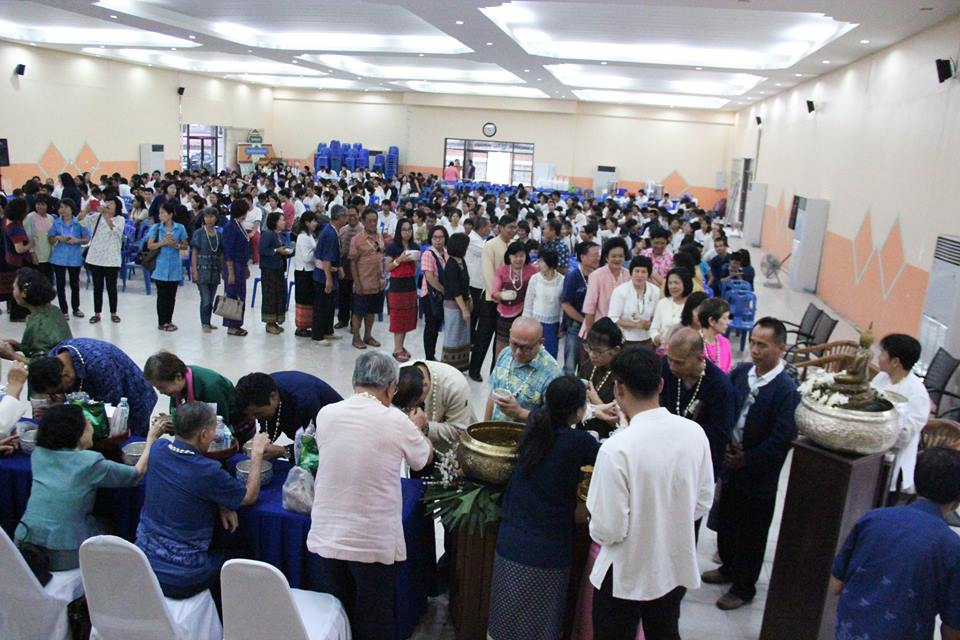 พิธีรดน้ำดำหัวคณาจารย์ 2560